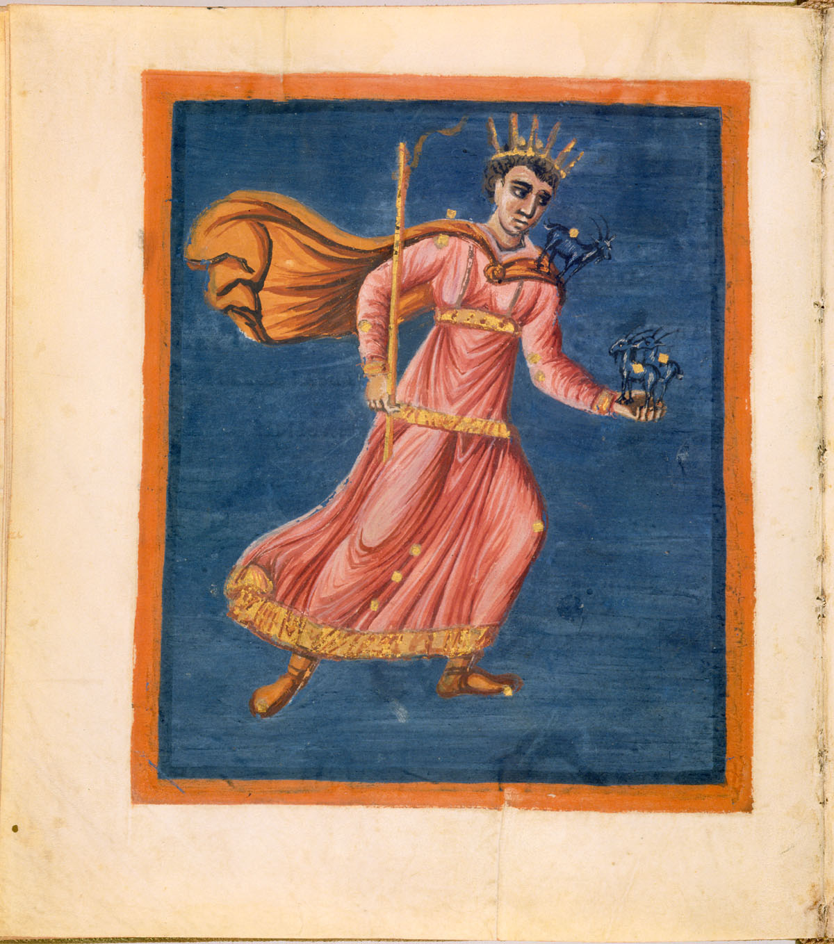 Fol. 22v Auriga